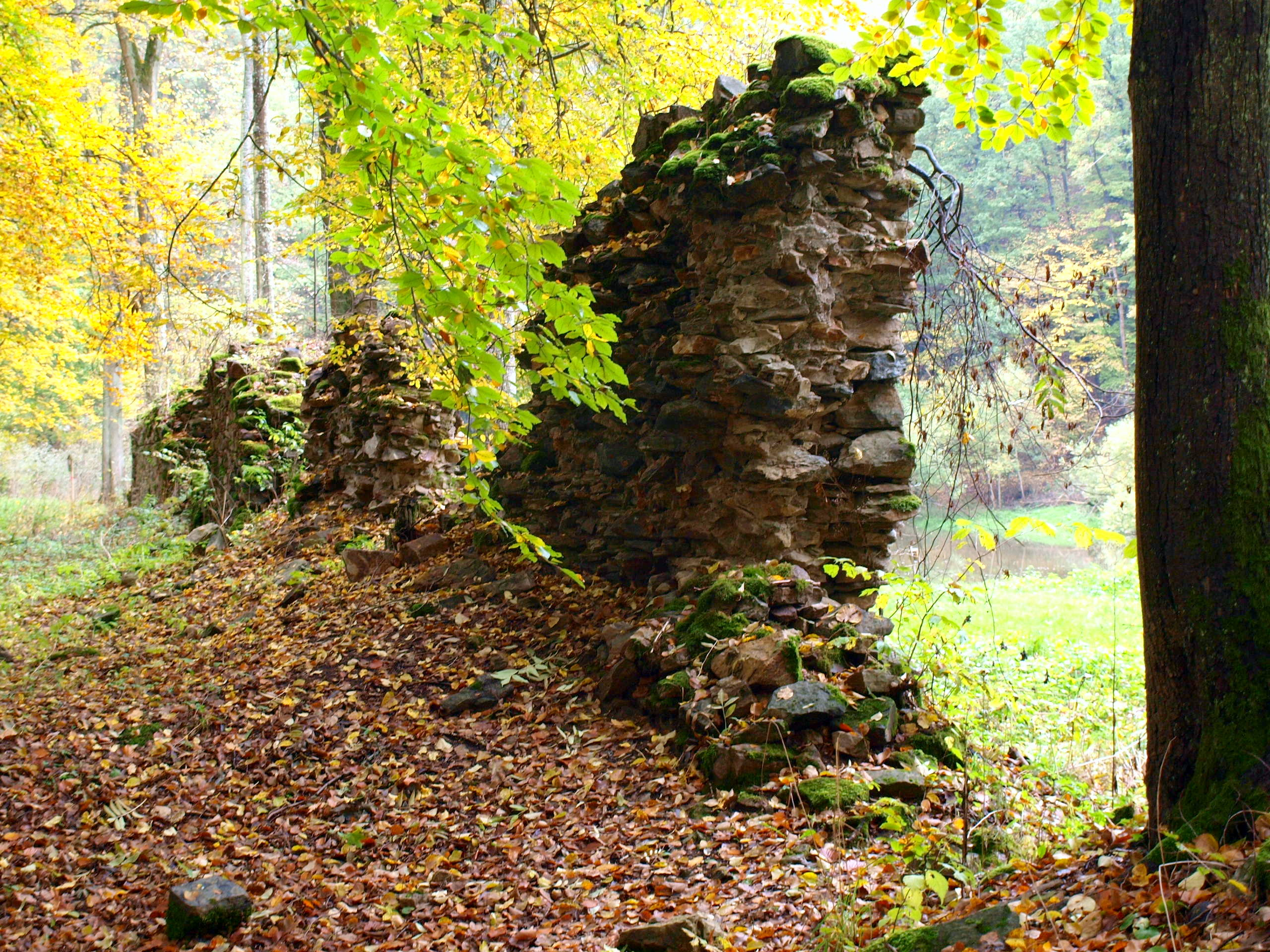 Příběnice, zbytky dolního opevnění